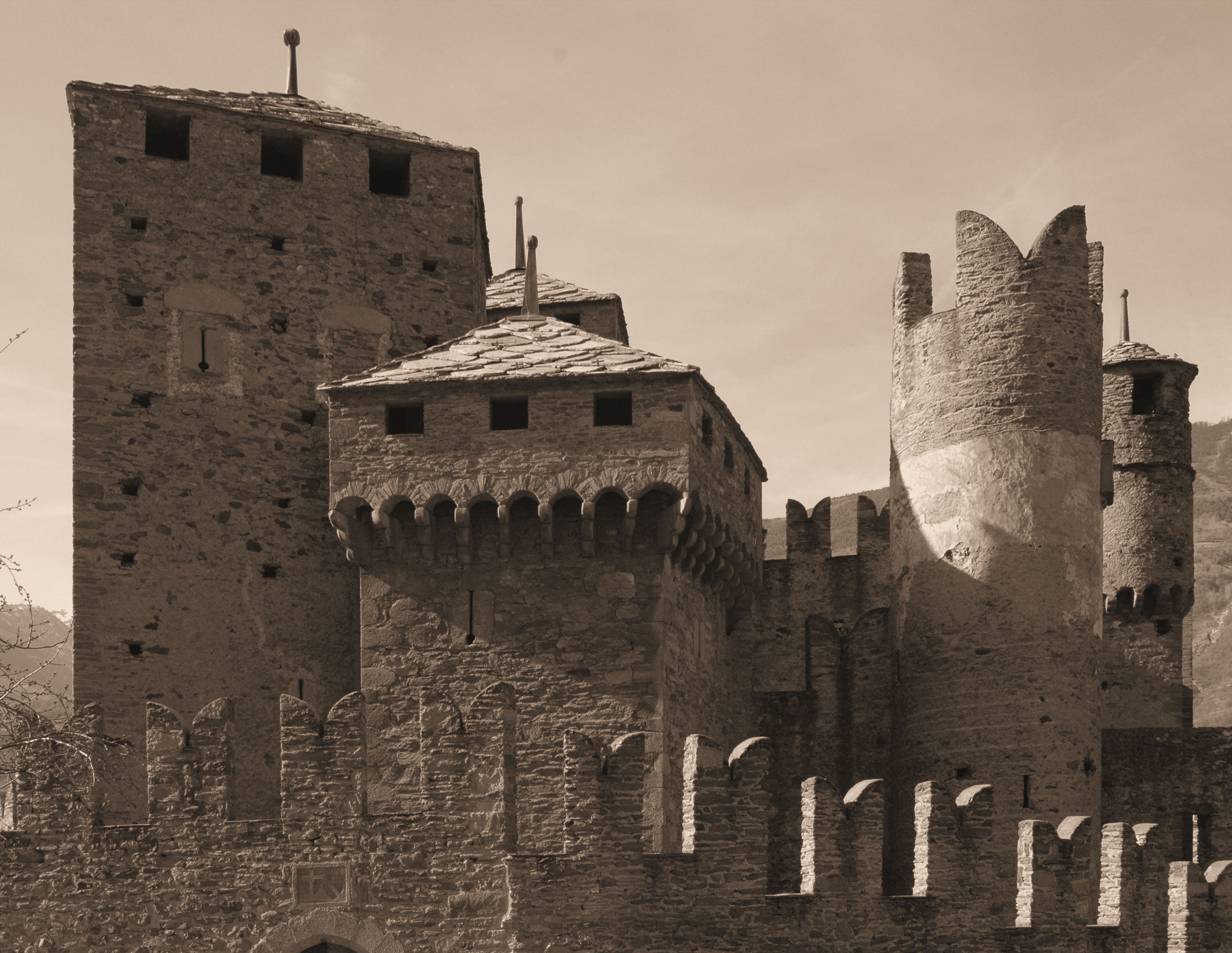 Torri e merli ghibellini del castello medioevale di Fénis in Val d'Aosta (Italia), virata seppia.